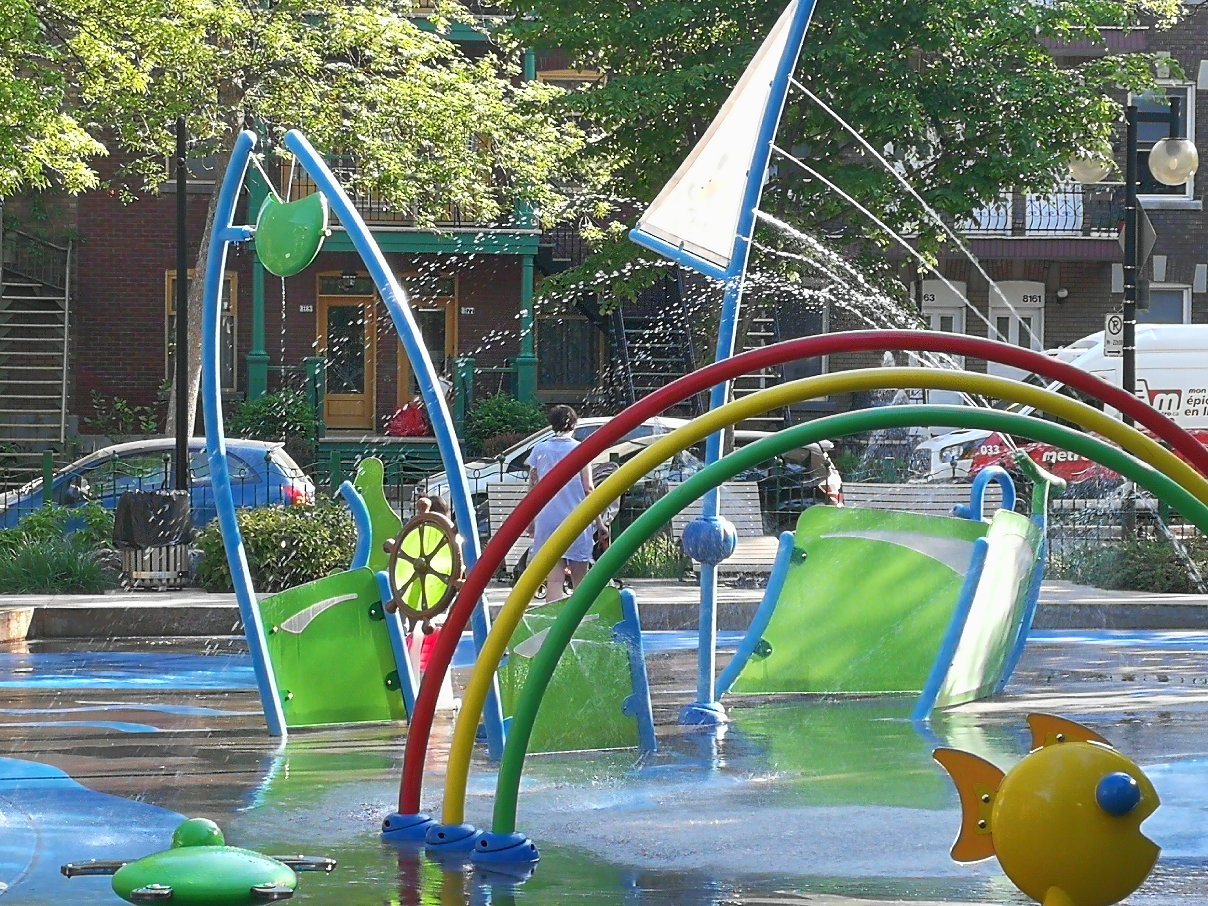 Première journée d'ouverture des jeux d'eau au parc Saint-Vincent-Ferrier, lors de la.